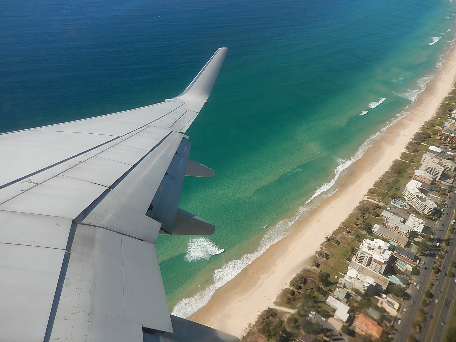 Green Coast